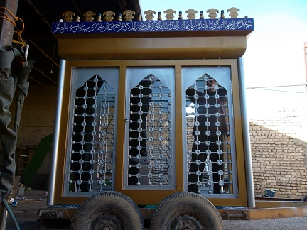 ضریح